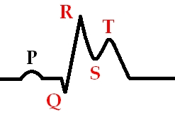 Стадия развивающегося инфаркта миокарда